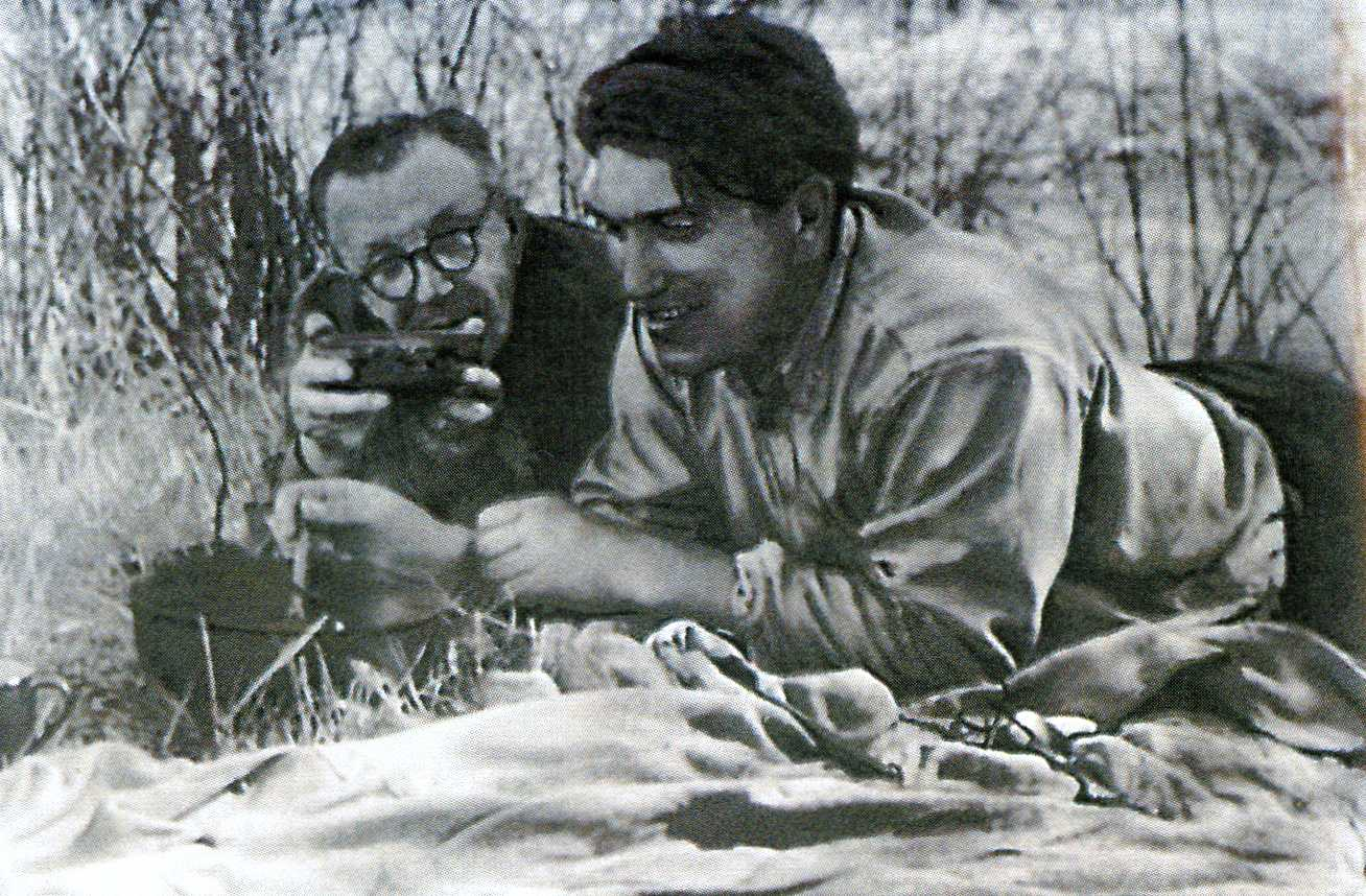 На рыбалке с племяннником Яковом Николаевичем Соколовым 1960гг.